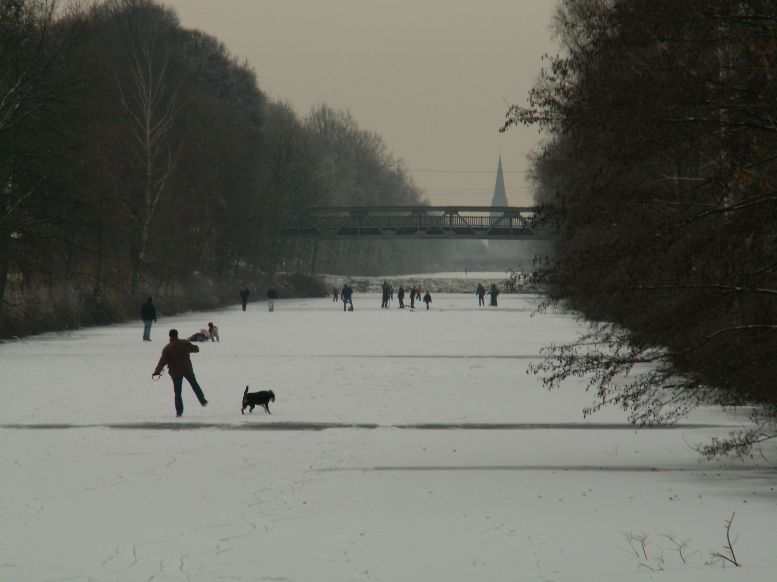 Alte Fahrt in Olfen, zugefroren im Januar 2009